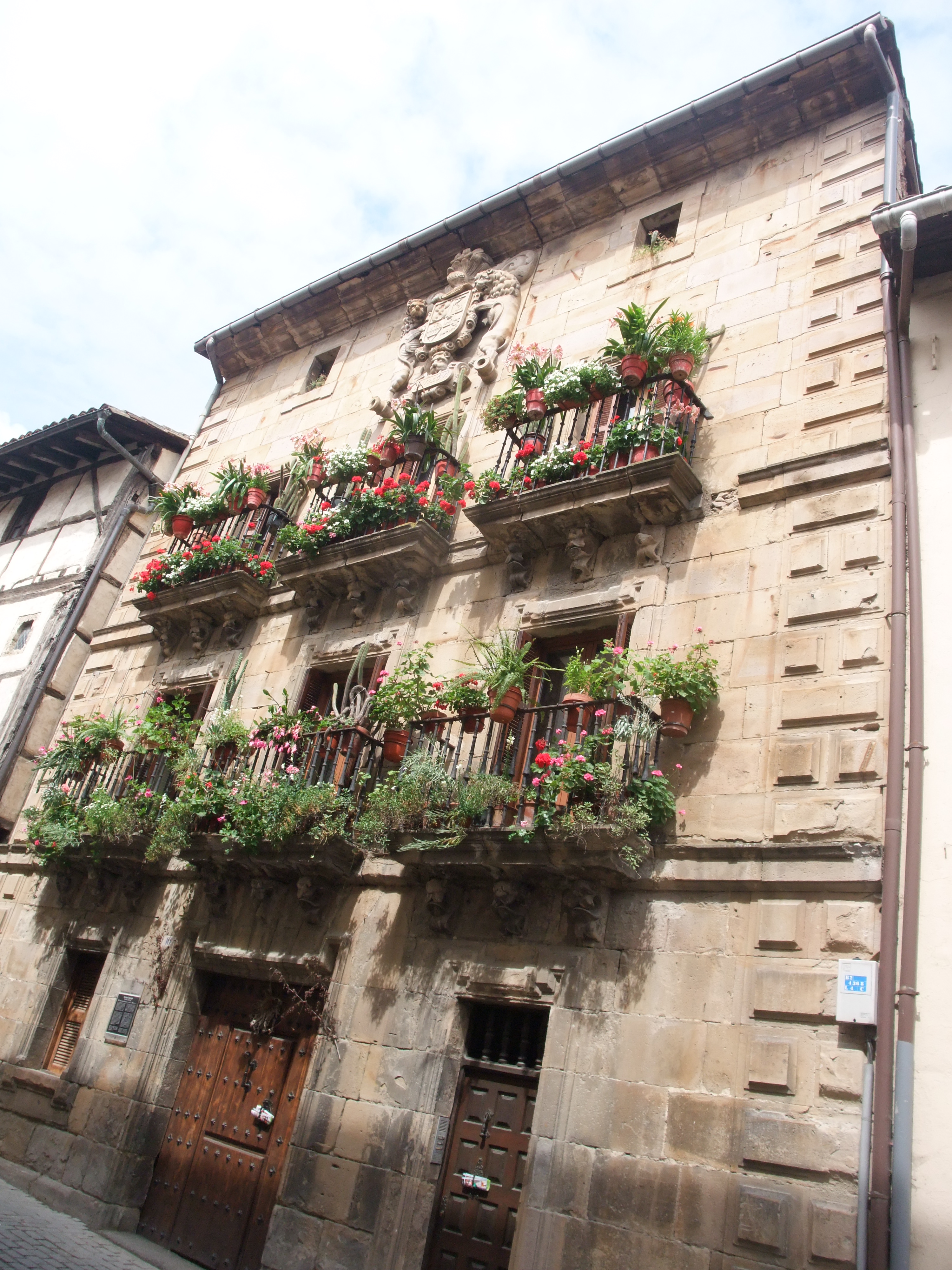 Segura (Guipúzcoa)-Palacio Jauregi-1